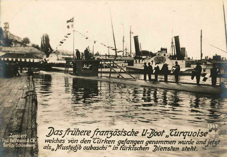 Sous-marin français le Turquoise capturé dans le détroit des Dardanelles en 1915 et passé sous pavillon turc.